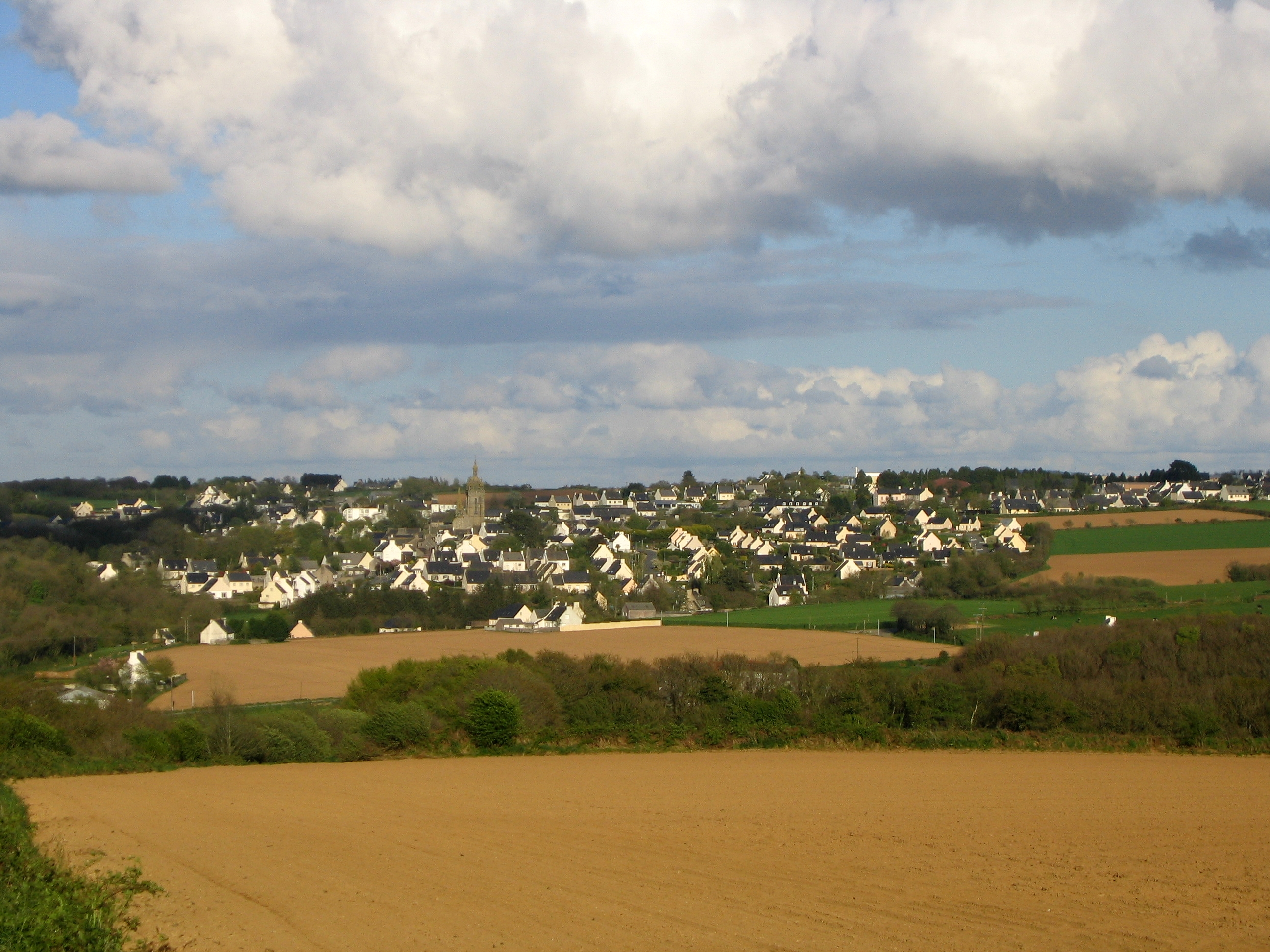 Vue de Saint-Thegonnec de la route de Kermat